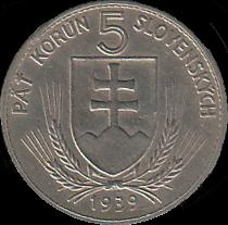 5 Slovak korún coin from 1939 - obverse